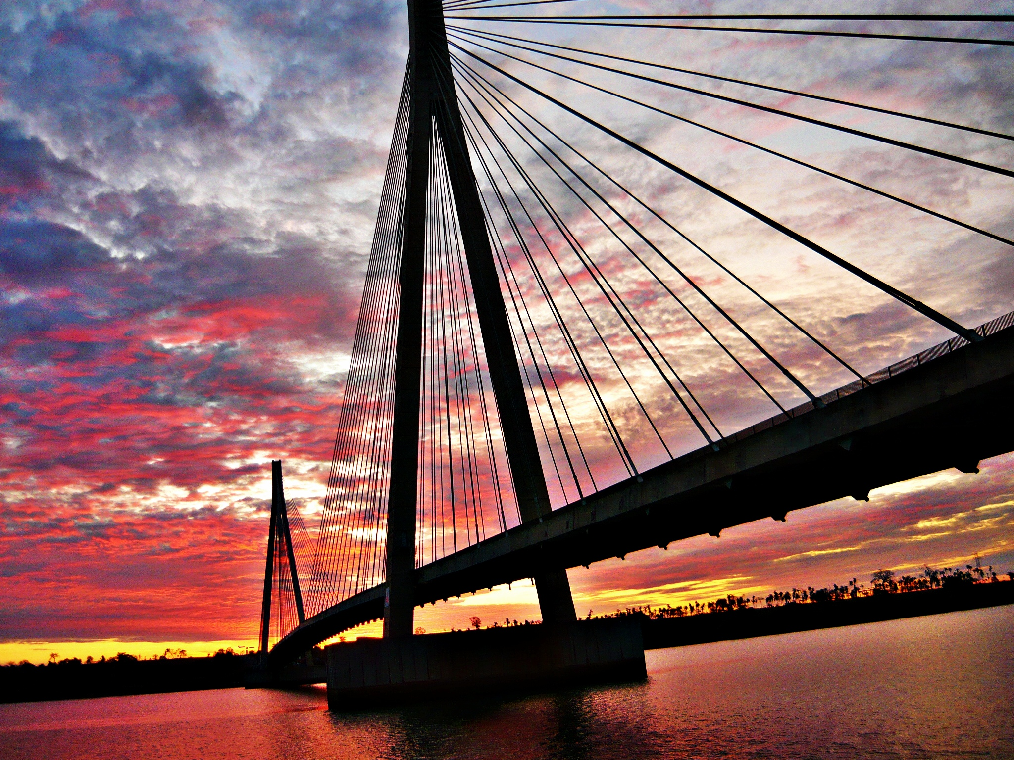 Ponte Alencastro ebtra Paranaíba-MS e Carneirinho-MG